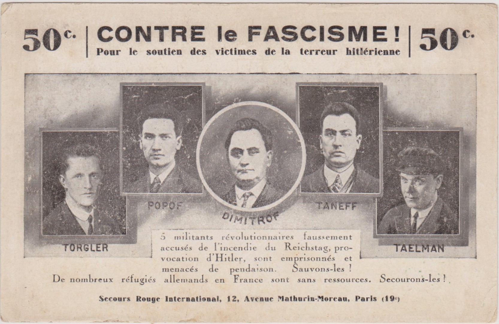 Carte postale édité par la section française du Secours rouge international contre le fascisme.